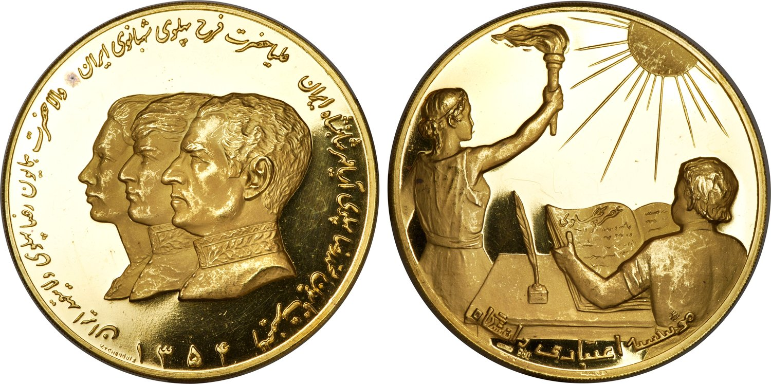 یادبود خانواده سلطنتی شامل شاه، شهبانو و ولیعهد